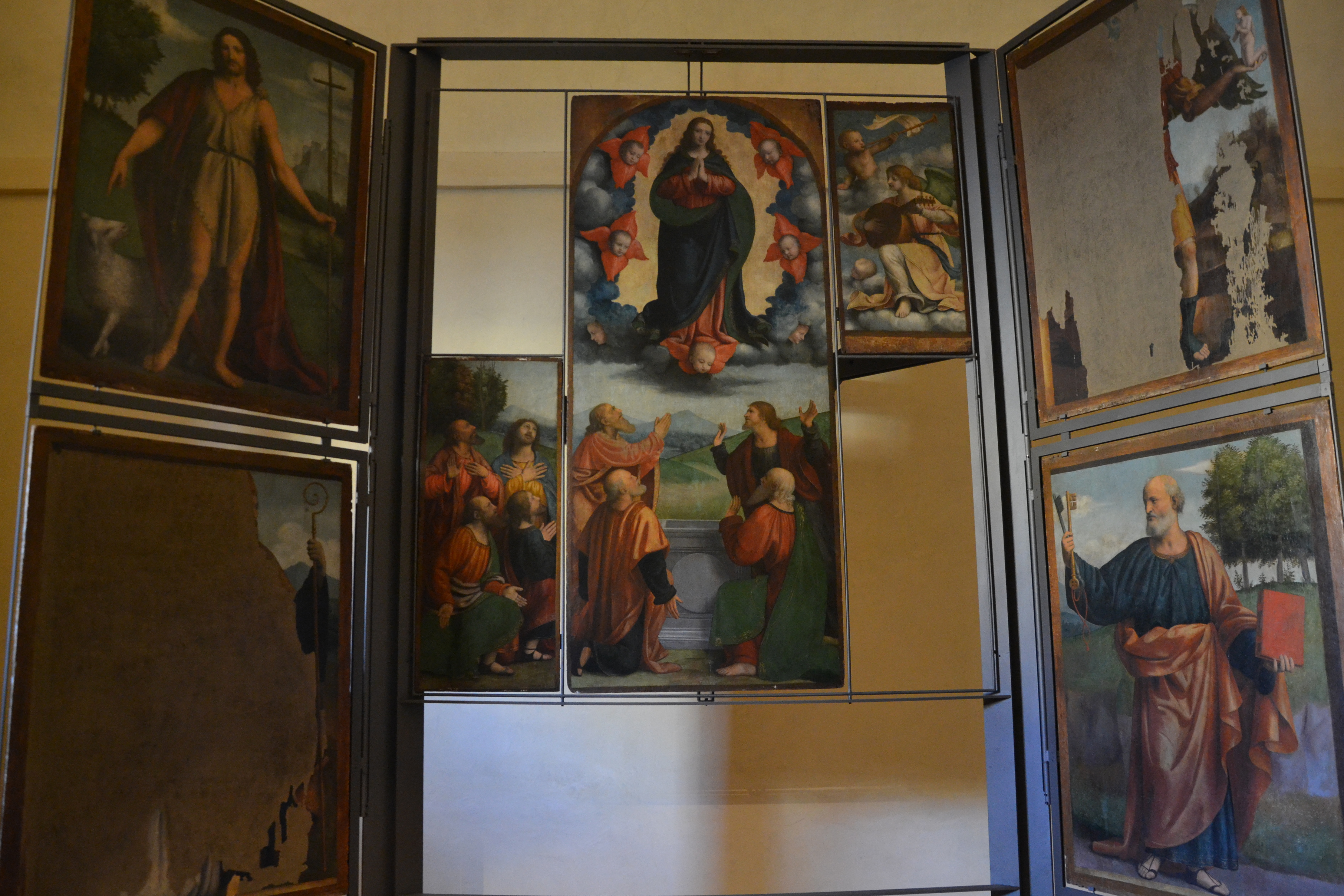 Museo dell’Abbazia di San Colombano, Bobbio, Polittico di Bernardino Luini commissionatolgi da G.B. Bagarotto, vescovo di Bobbio, e databile al 1522. L’opera composta di più parti, alcune delle quali perdute, originariamente collocata sull’altare maggiore della cattedrale di Bobbio, presenta nella parte centrale l’Assunzione della Vergine, affiancata da Apostoli e sormontata da angeli musicanti; circondate da quattro grandi tavole dipinte su due facce raffiguranti Padri della Chiesa e Santi.